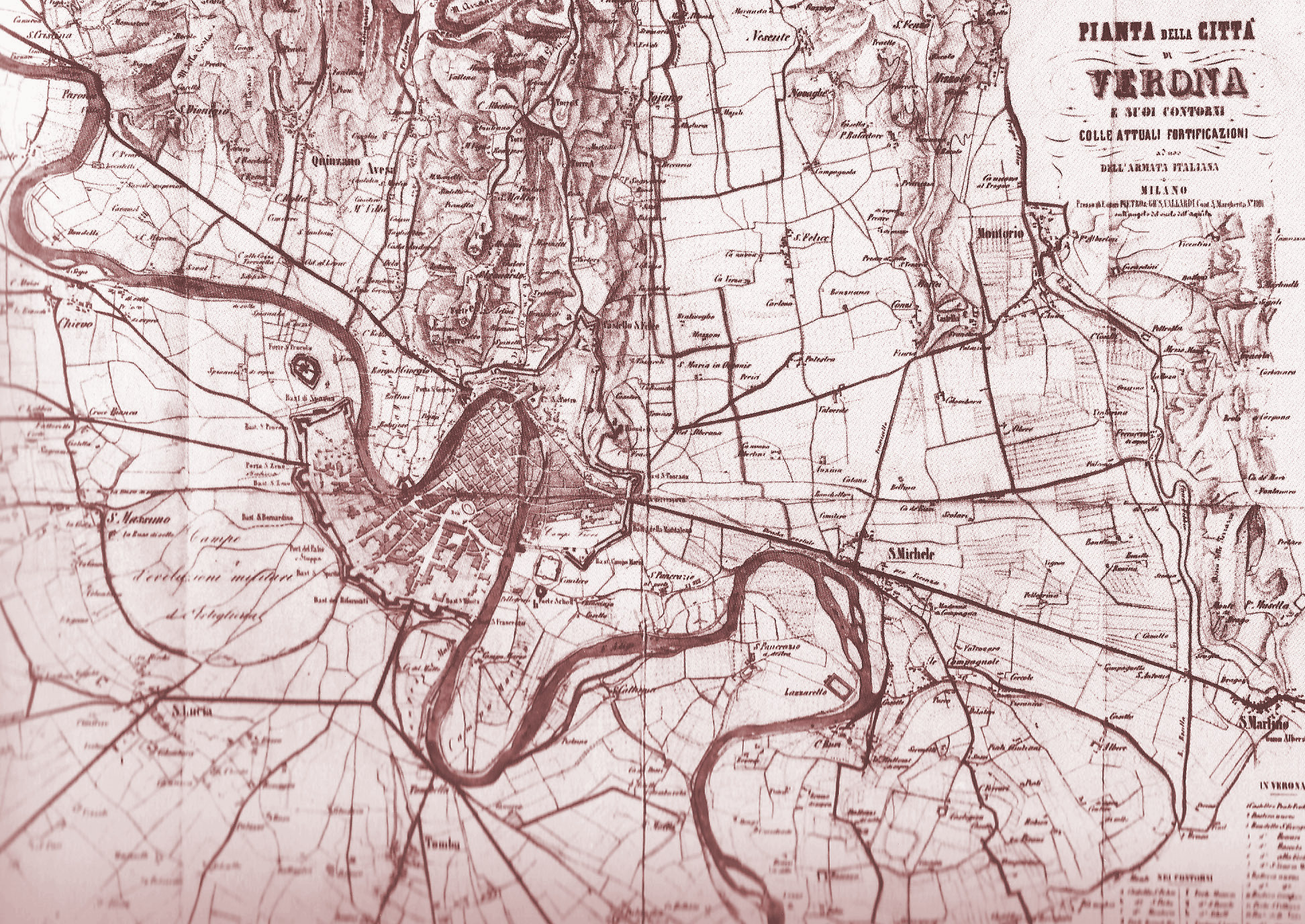 Fonte: "La piazzaforte di Verona sotto la dominazione austriaca 1814-1866 (edizione 1980)" Mappa della provincia Verona nel 1848